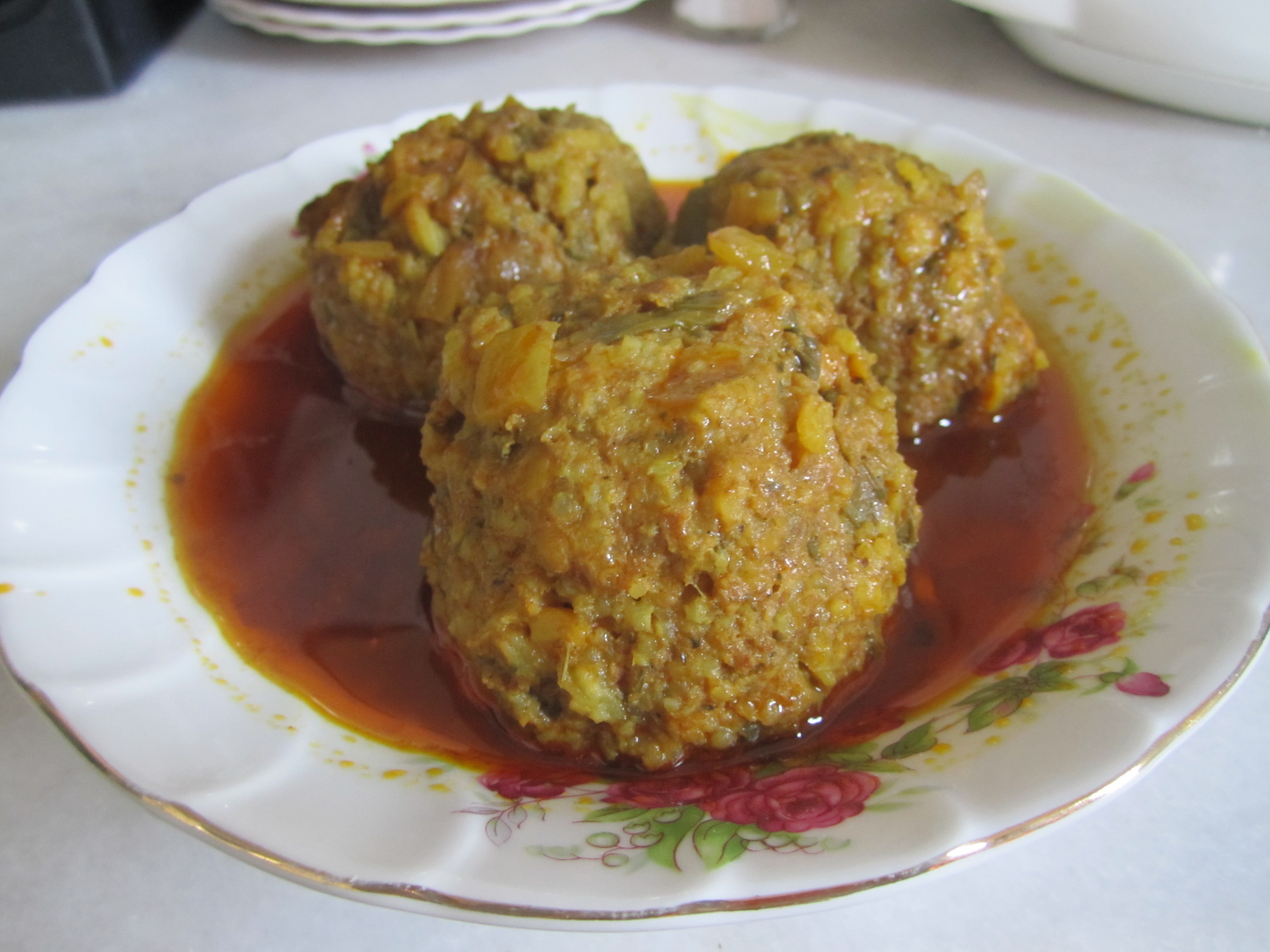 Kufteh Template:FaS, in manchen Dialekten auch Kafta, Kifta) sind meist kräftig gewürzte, gebratene, gebackene oder gegrillte Hackfleischbällchen, -röllchen oder -fladen, vor allem aus Lammfleisch oder Rindfleisch (auch gemischt), die in zahlreichen Varianten in der gesamten orientalischen Küche verbreitet sind.